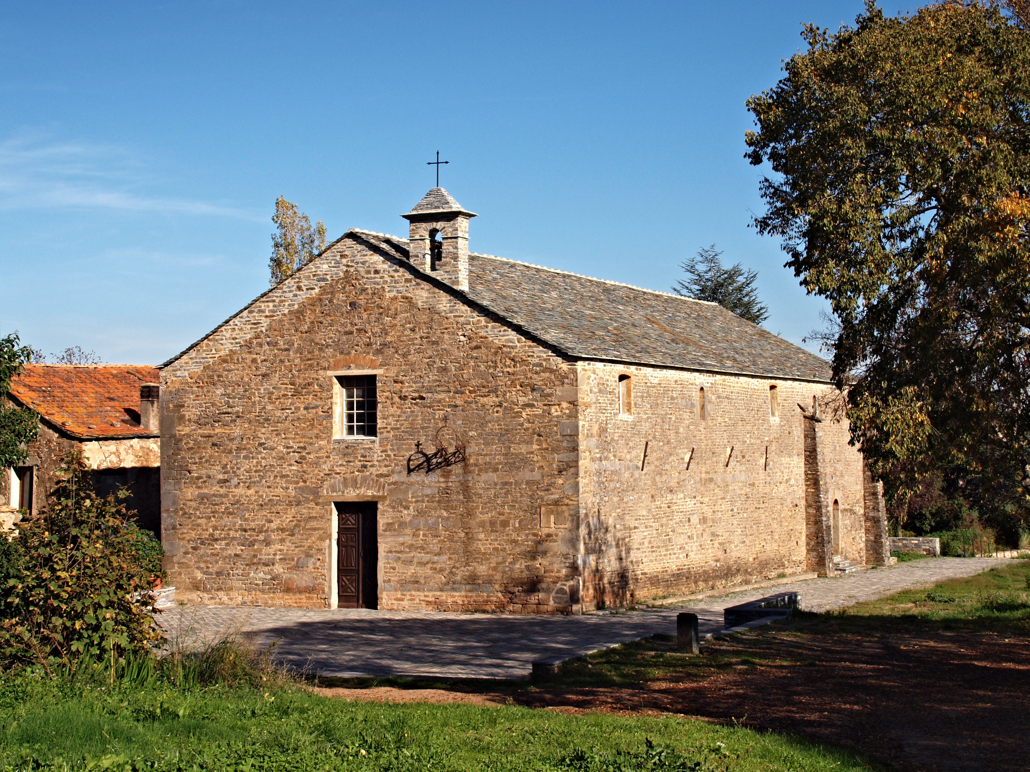 Castellare-di-Casinca - Eglise San Pancraziu